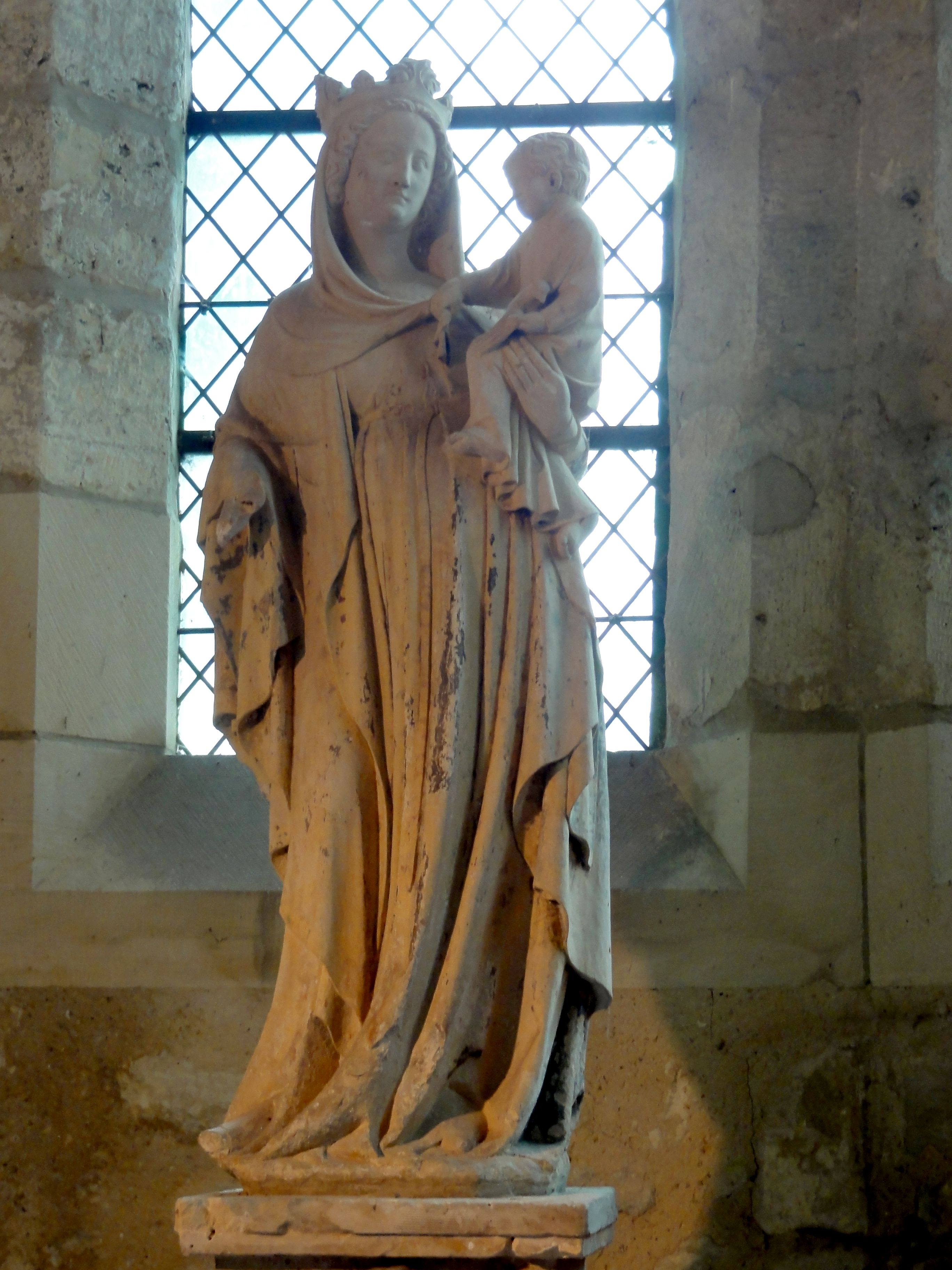 Vierge à l'Enfant.